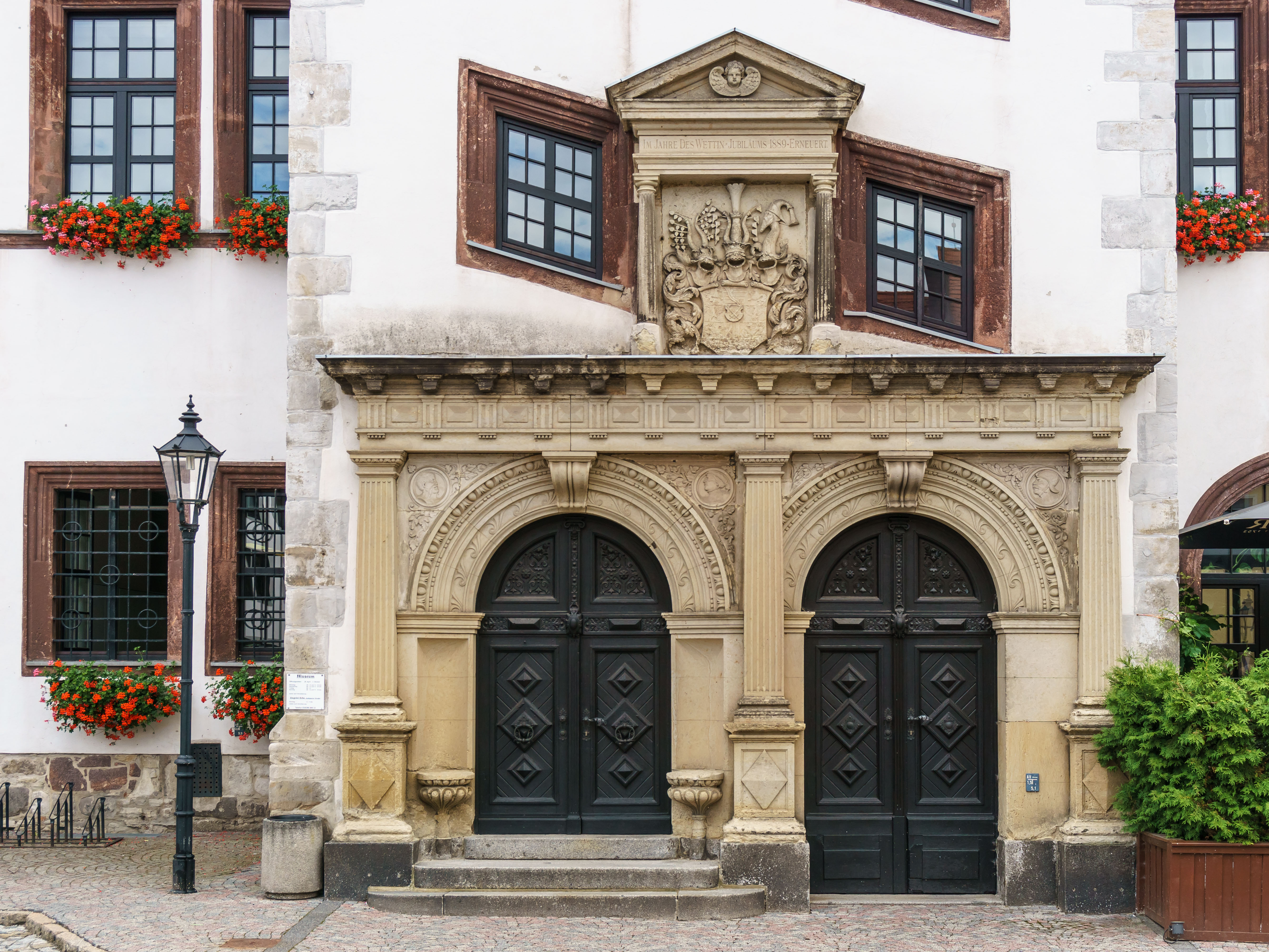 Hauptportal Rathaus, Markt 1 in Pegau